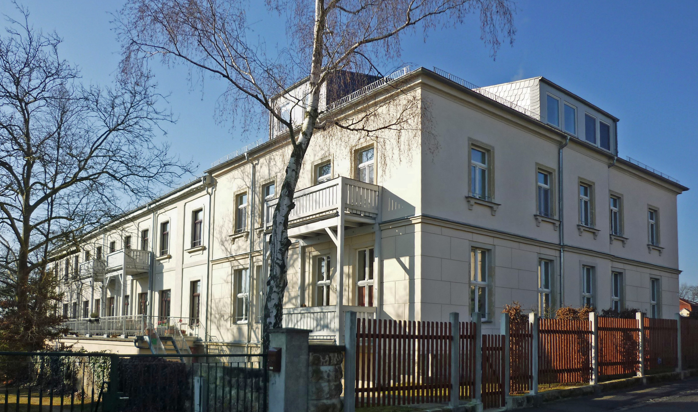 Haus Max-Hünig-Str. 13 in Dresden-Klotzsche